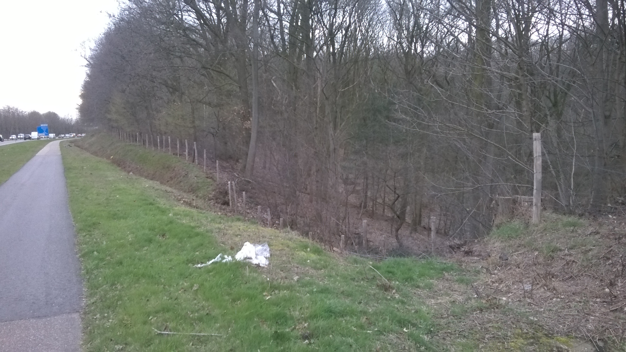 De kuil van de voormalige bruinkoolgroeve Louise I op de Graetheide is te zien. Tegenwoordig heeft het gebied Heksenberg. De foto is genomen vanaf de Urmonderbaan bij hectometerpaaltje 3,0 in noordwestelijke richting.